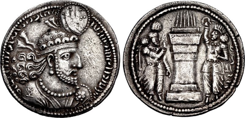 Dracma do xá Hormisda I